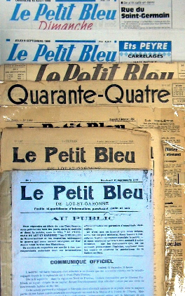 Panorama des différentes identités visuelles